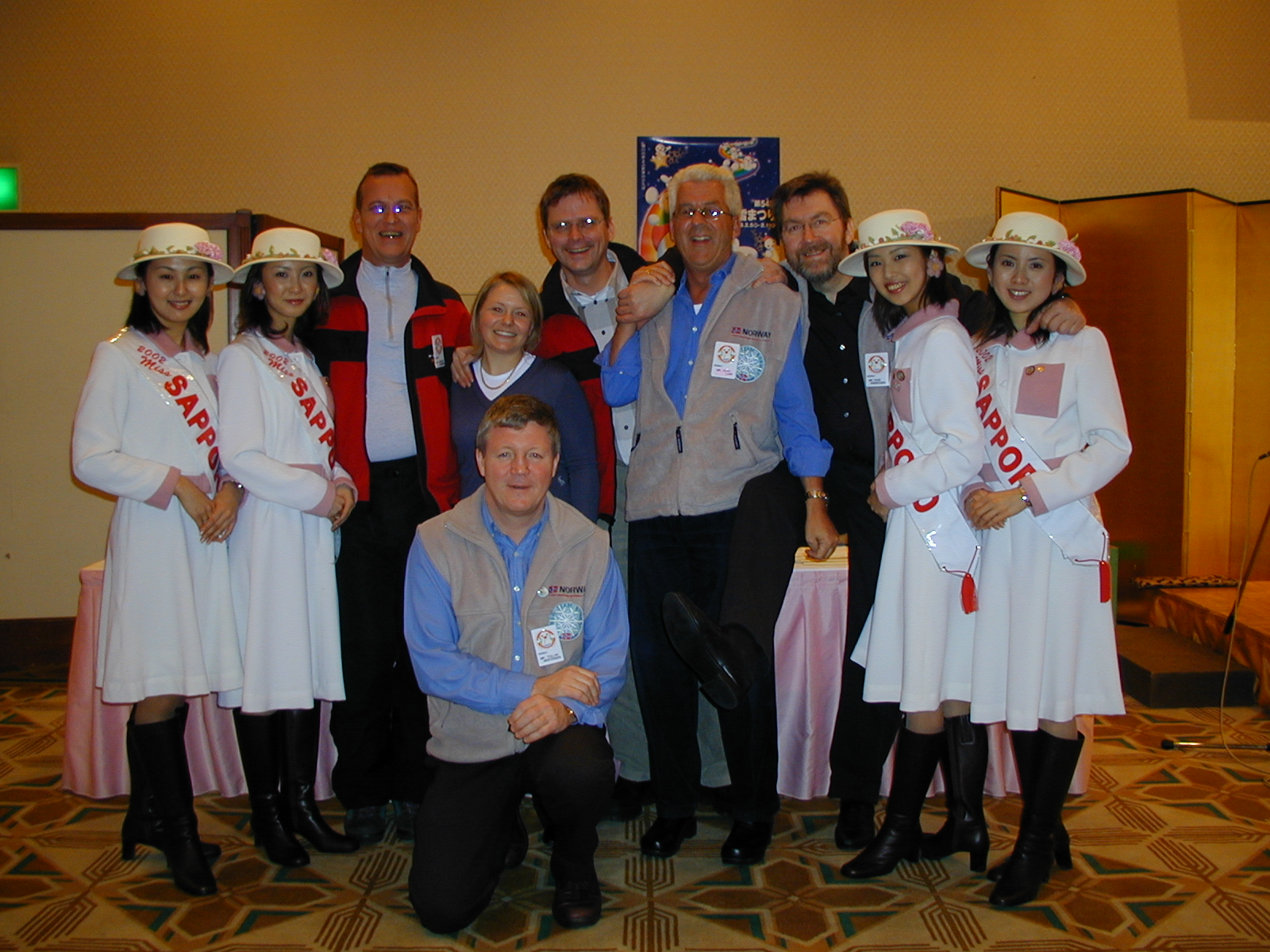 Fra åpningssermonien 2003